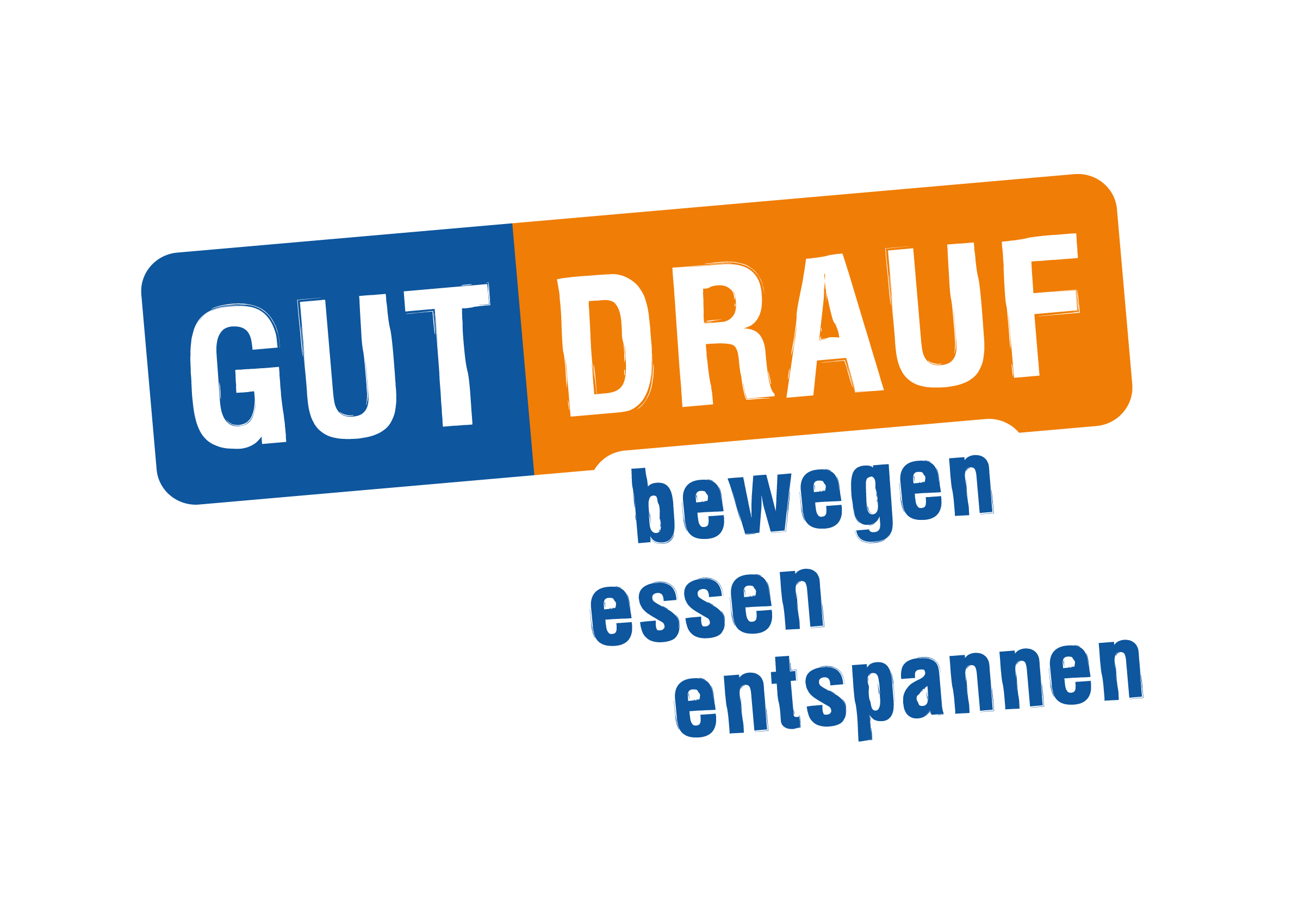 Logo der Jugendkampagne GUT DRAUF